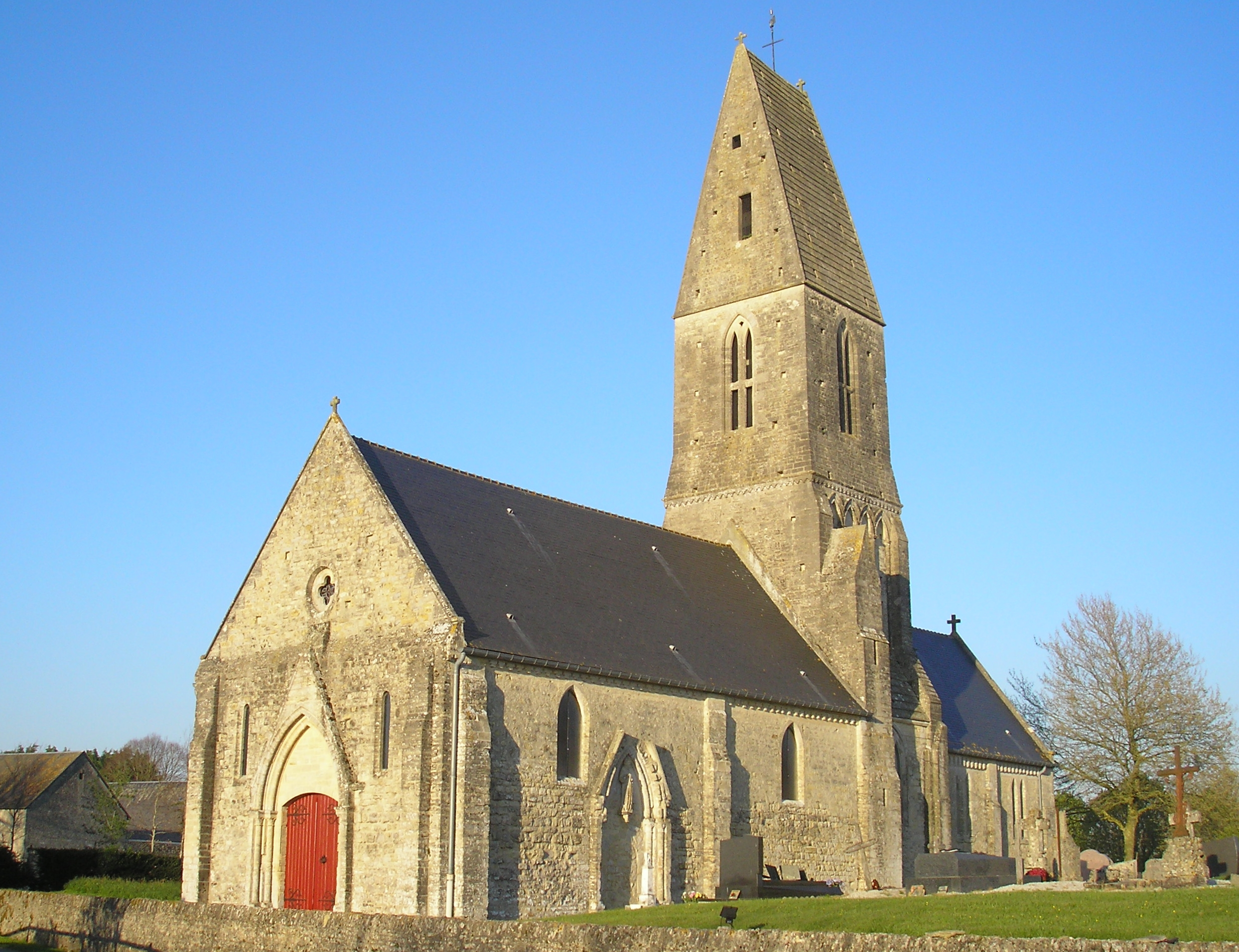 Cussy (Normandie, France). L'église Saint-Barthélemy.